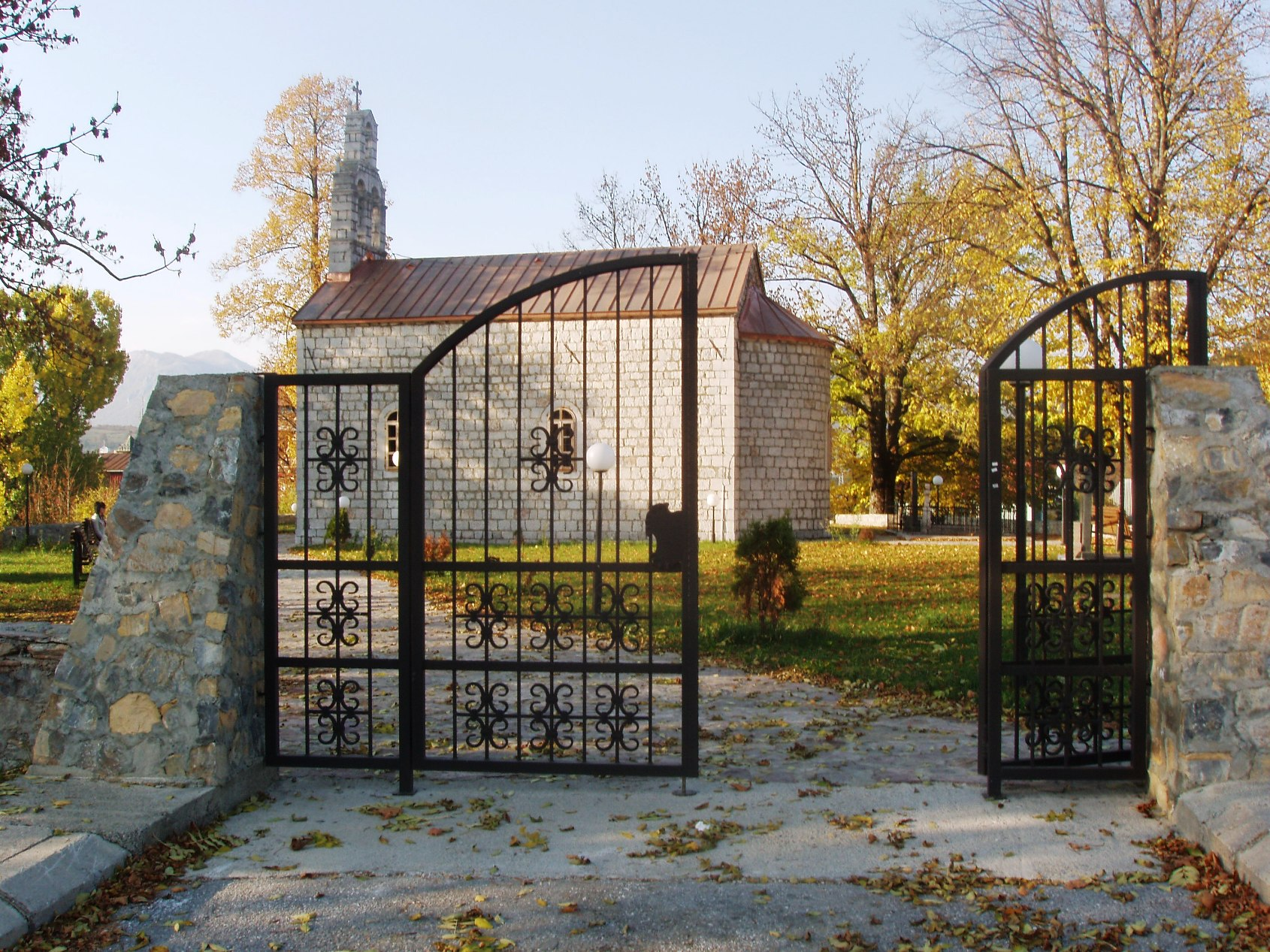 Pravoslavna crkva u Kolašinu